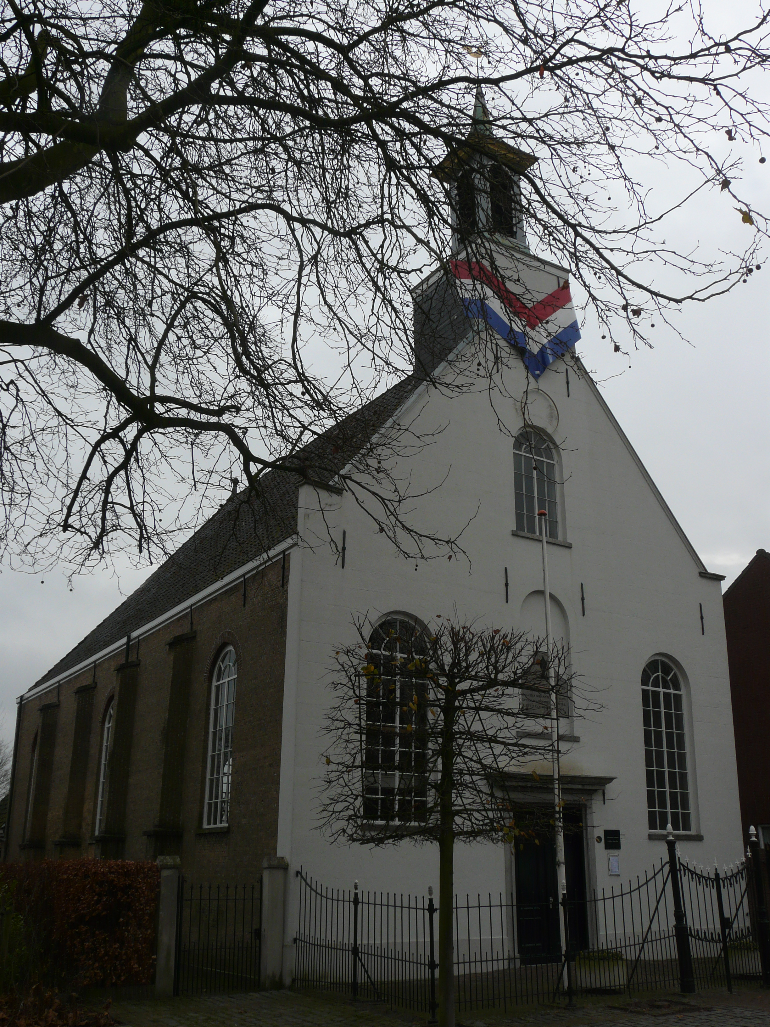 Protestanse kerk in Terheijden